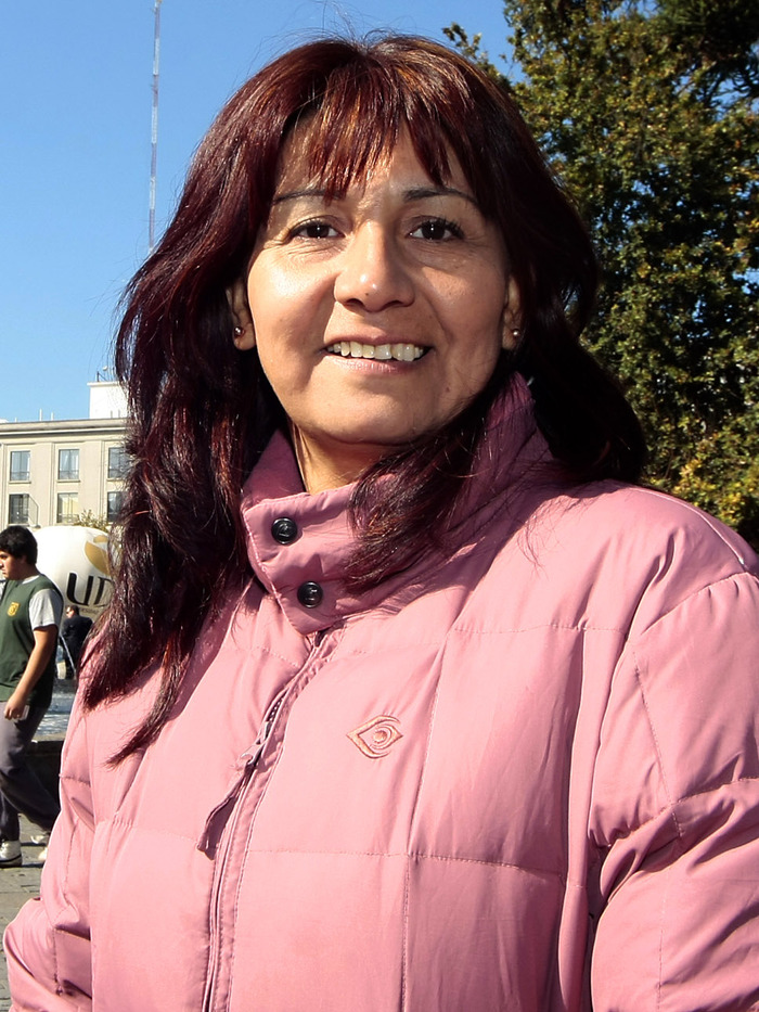 Roxana Miranda en Concepción